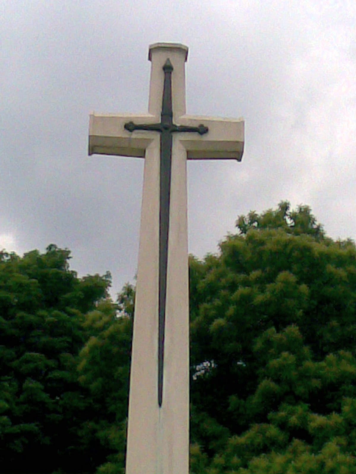 Rheinberg War Cemeterey St.-Patrick-Kreuz mit Kreuzritter-Schwert